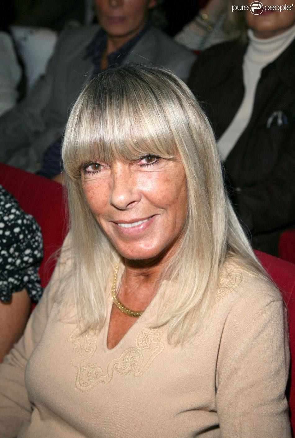 Dany Saval lors d'une cérémonie